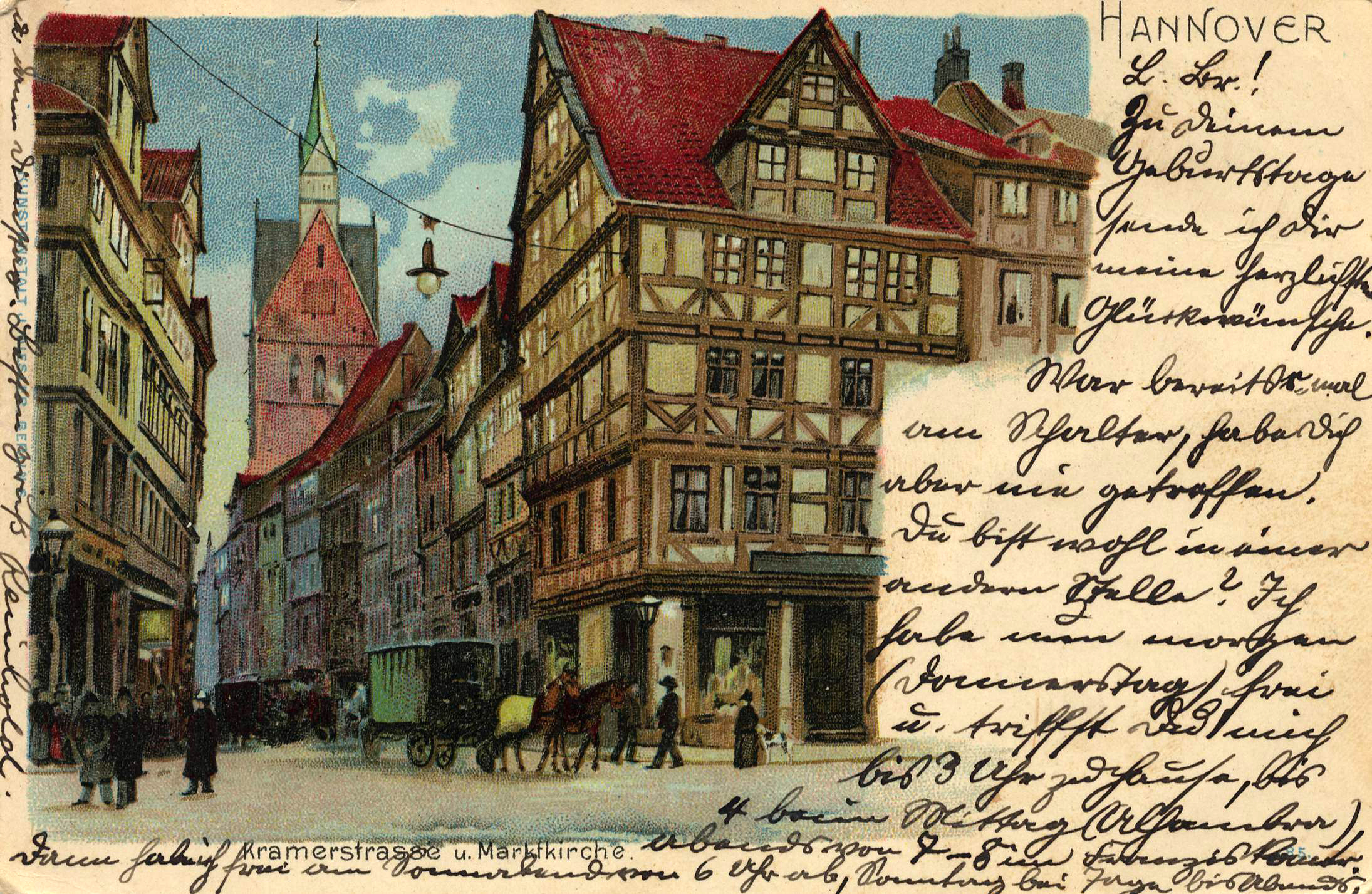 Farbig chromolithografierte Ansichtskarte mit der Nummer 85 aus dem Berliner Verlag von Johannes Miesler mit einem Blick um 1900 durch die Kramerstraße in Hannover Richtung Marktkirche ...